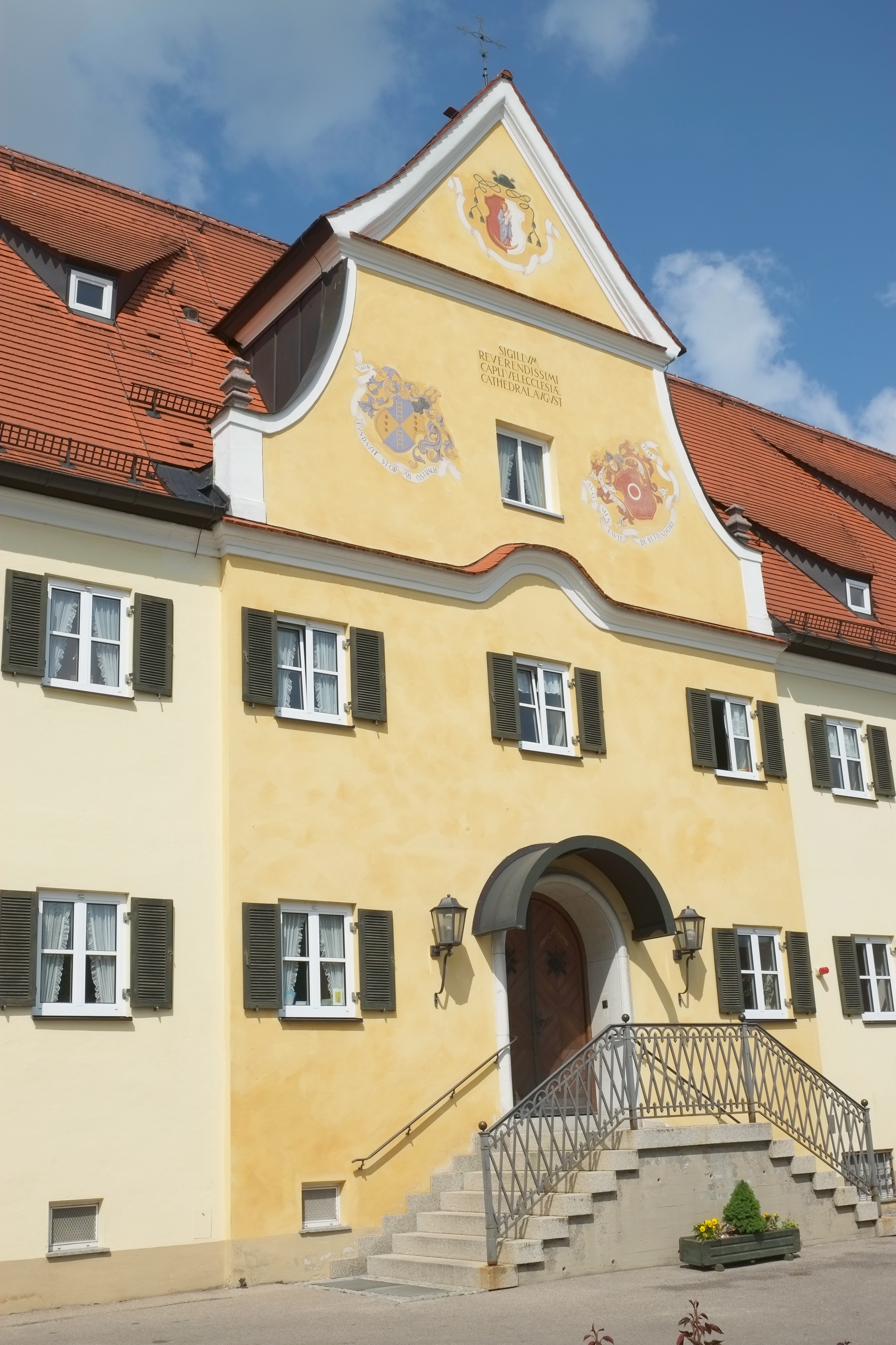 Spital in Dinkelscherben im Landkreis Augsburg (Bayern, Deutschland)